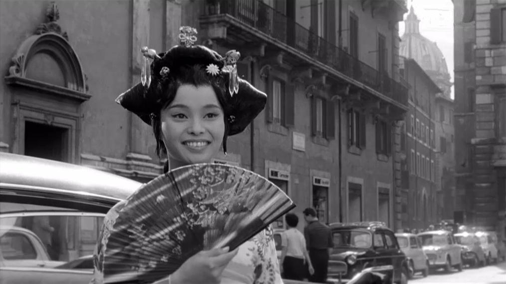 Fotogramma del film Akiko (1961)